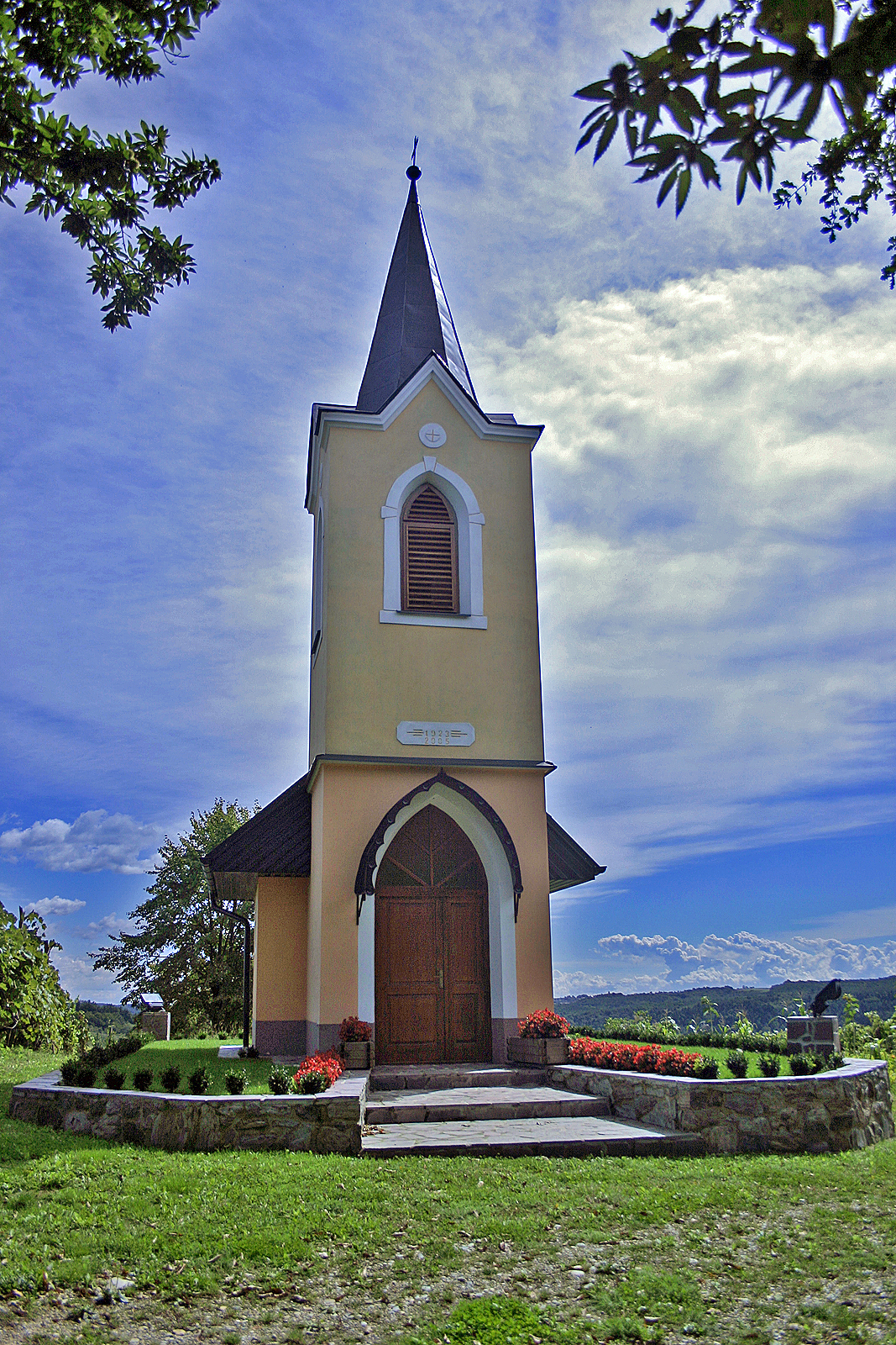 Kapela, Stanjevci. Chapel, Stanjevci. Kapelle, Stanjevci.